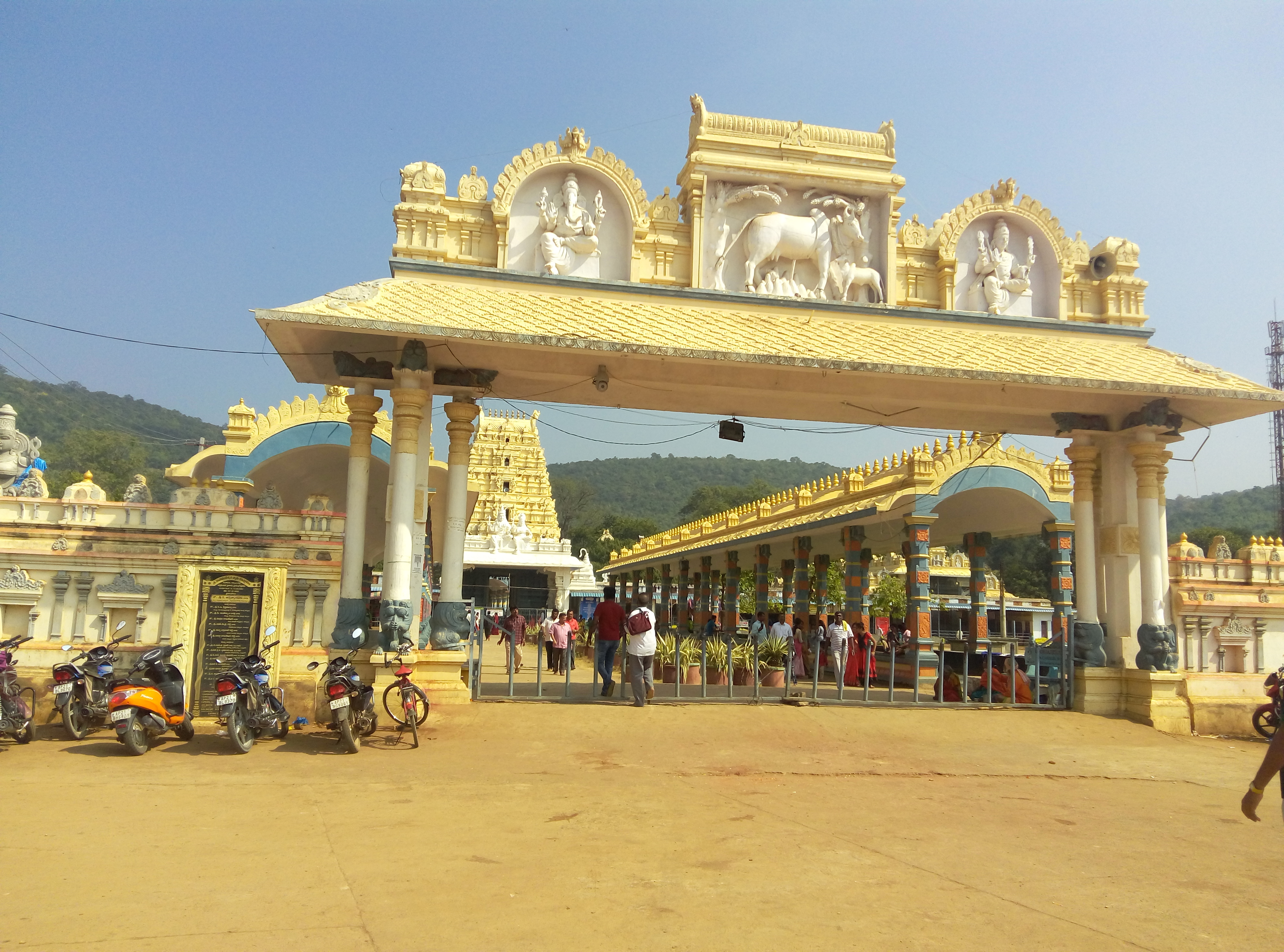 ఈ ఆలయం కర్నూలు జిల్లా,మహానంది మండలం,మహానంది గ్రామంలోగల ప్రముఖ శైవ క్షేత్రం.నంద్యాలకు 14 కి.మీ దూరంలో ఉంది. ఇక్కడ గల స్వామి మహానందీశ్వరుడు, అమ్మవారు కామేశ్వరీ దేవి. ఇక్కడి మహానందీశ్వర దేవాలయం 7వ శతాబ్దినాటిది. ప్రధాన ఆలయానికి ఆలయ ముఖ ద్వారం గోపురానికి మధ్యలో ఉన్న పుష్కరిణి లోనికి స్వచ్ఛమైన నీరు సర్వ వేళలా గోముఖ శిలనుండి నిరంతరం పారుతుంటాయి.